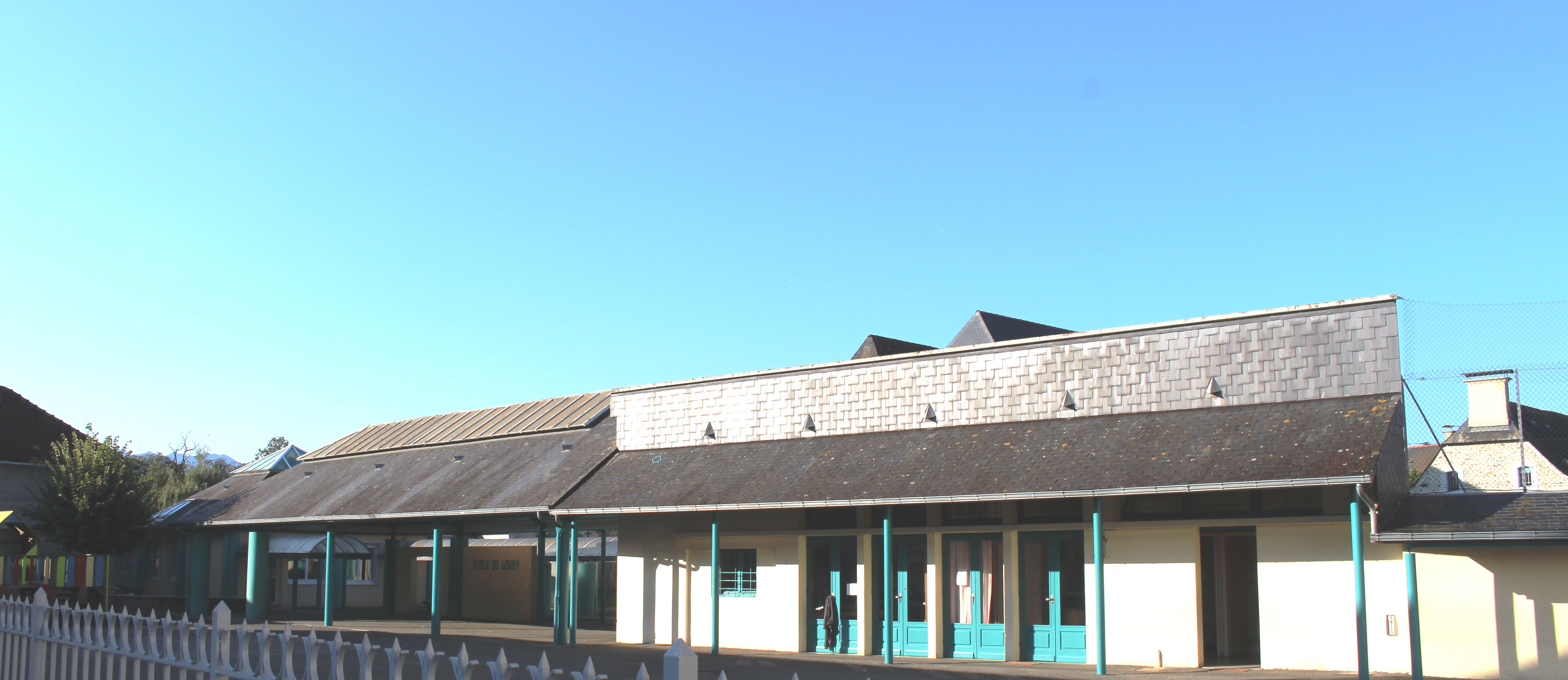 École de Louey (Hautes-Pyrénées)